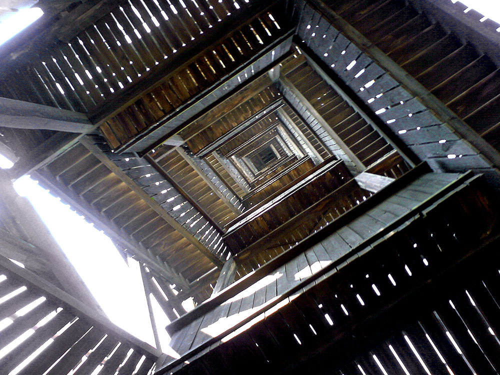 Goetheturm Frankfurt am Main/Sachsenhausen. Treppenhaus des Holzturmes